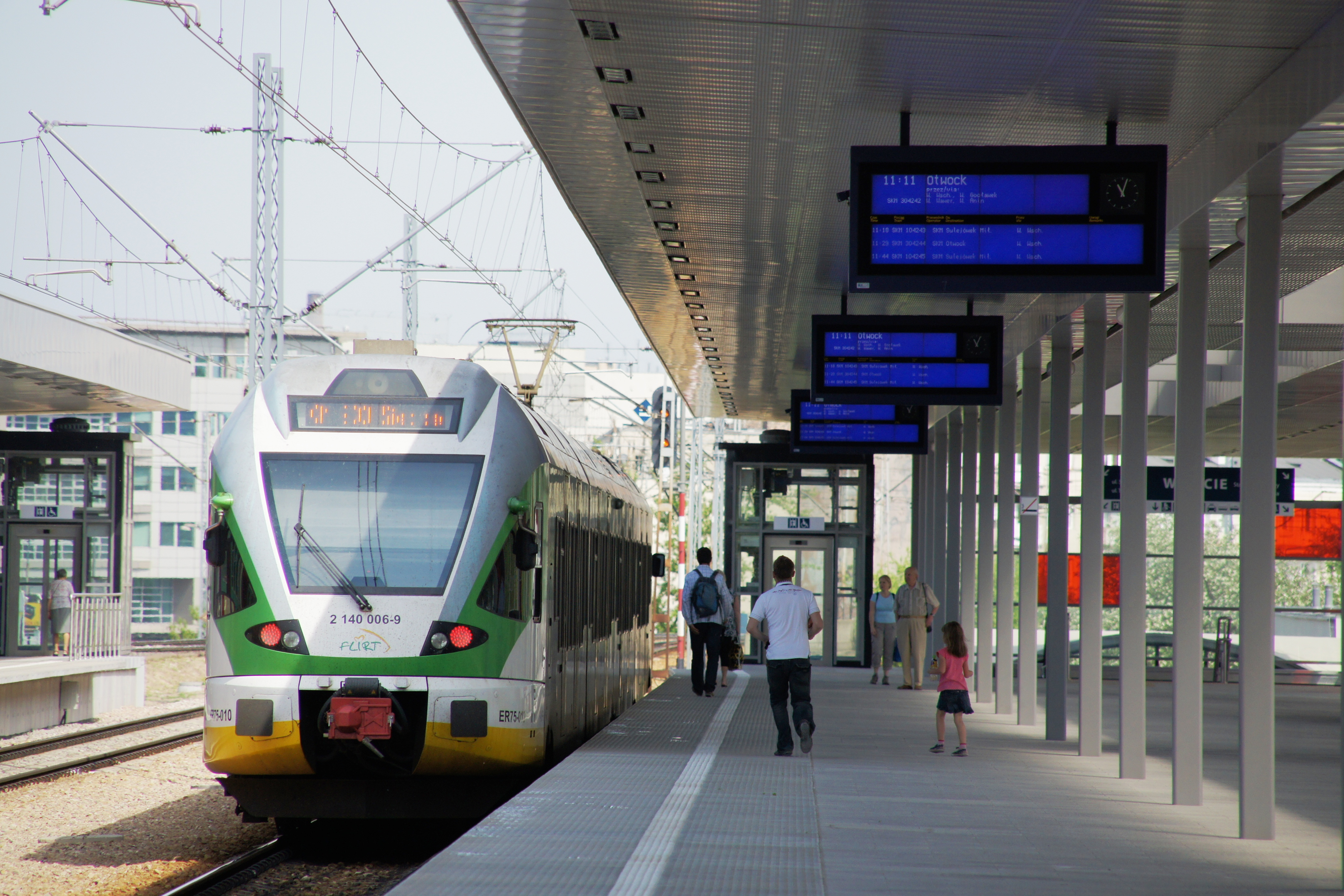 Stacja Warszawa Stadion - 05.05.2012 - dzień otwarcia po remoncie